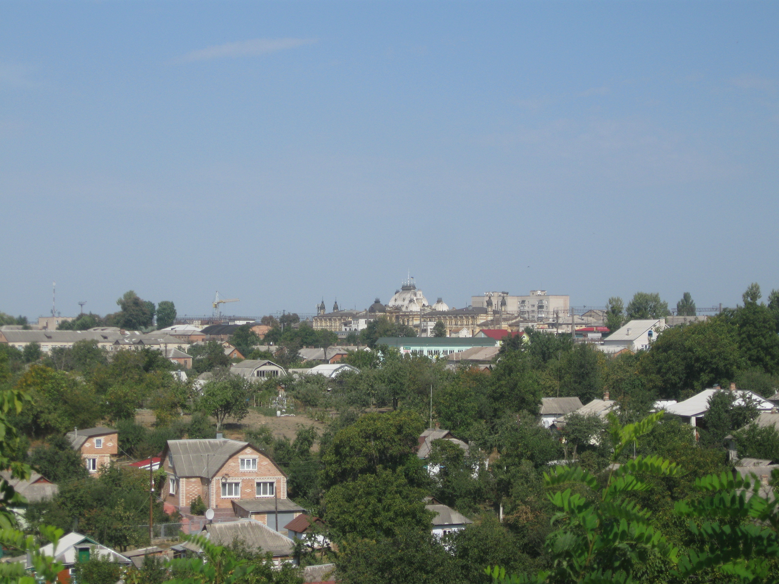 Залізничний вокзал Жмеринка